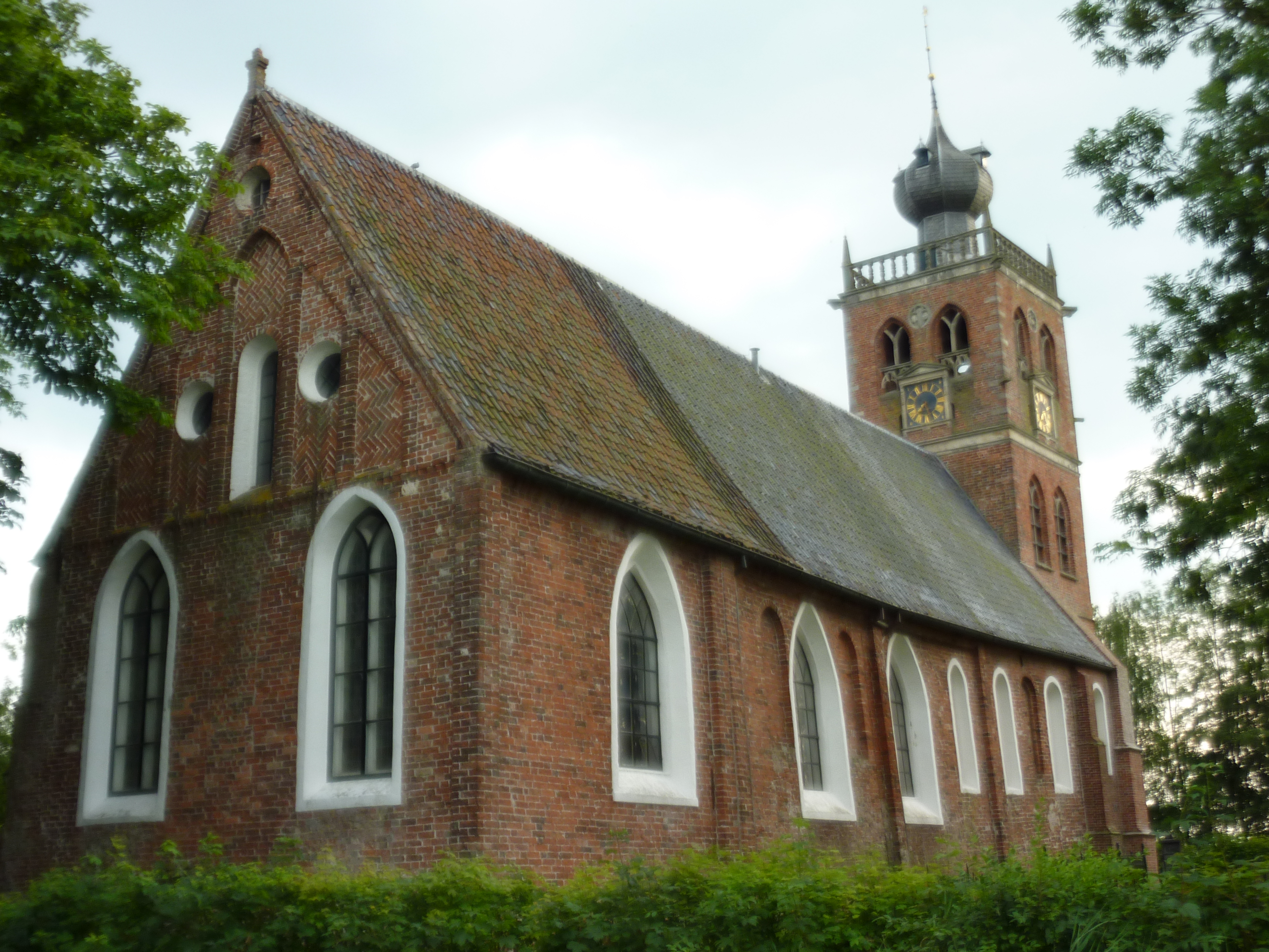 NH kerk, Noordwolde (Groningen) 47″ N, 6° 35′ 17.71″ E